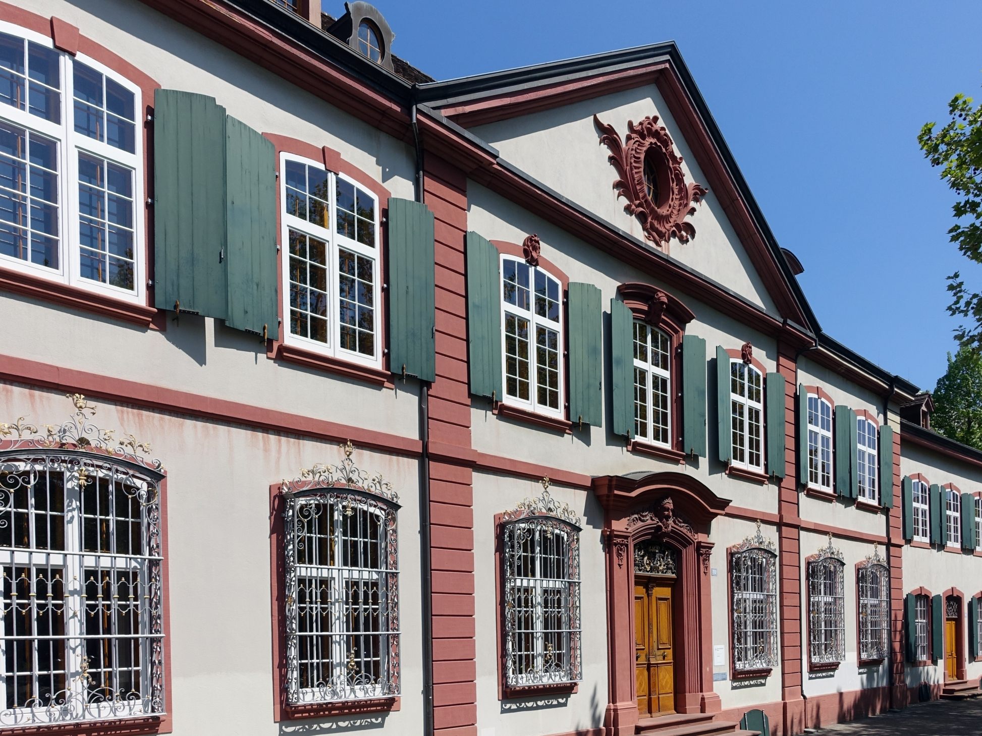 Peter Ochs (1772–1821) Politiker, Jurist, Historiker und Schriftsteller. Von 1780–1800 Besitzer des Holsteinerhof an der Hebelstrasse 32 in Basel